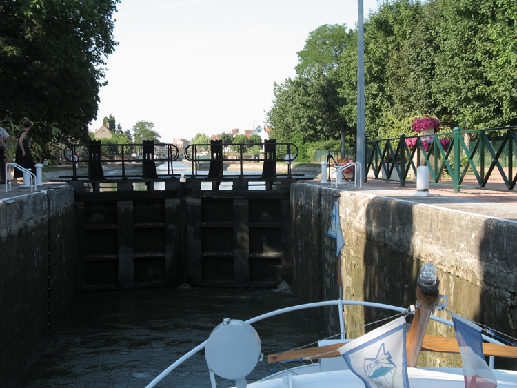 Description du contenu : Ecluse d'accés en aval du pont canal de Digoin qui est le passage vers le canal du Centre qui relie la Loire à la Saône. Source : « œuvre personnelle » (own work en anglais). Date de publication 30/12/2006. Auteur du fichier : Michel CLAIR